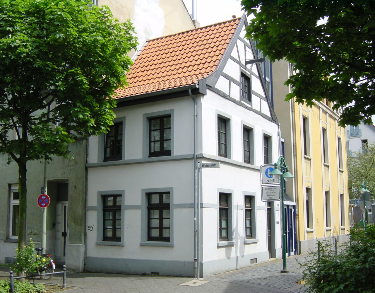 Description: orginal Weberhaus, Krefeld Date: 22.5.2006 Author: DER UNFASSBARE